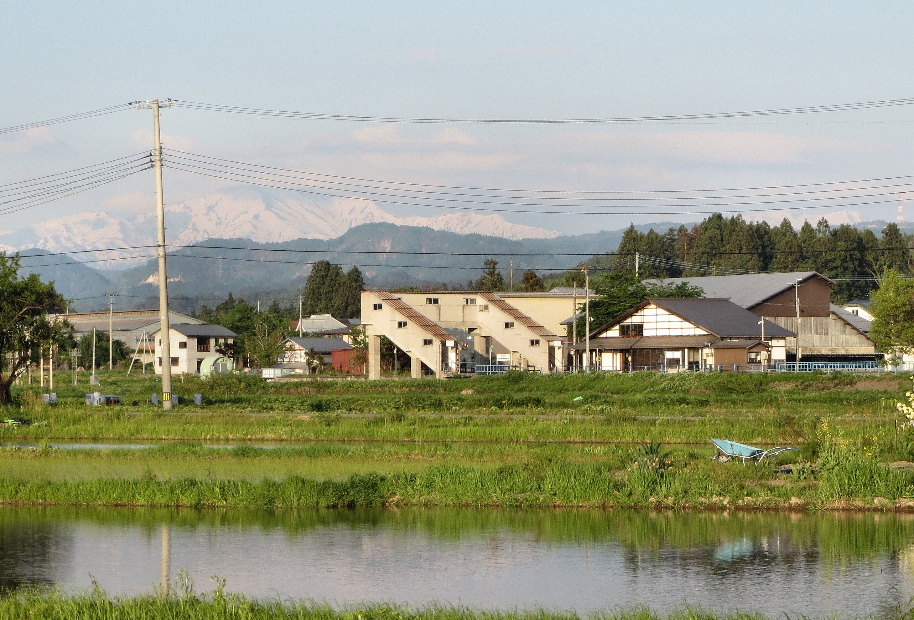 東側からの羽前椿駅